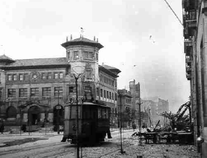 El edificio de correos de Santander (Cantabria), tras el icendio practicamente intacto. Fue uno de los pocos que sobrevivieron al desastre.